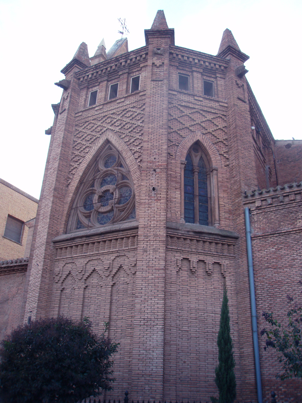 Exterior del ábside de la Iglesia de San Francisco Javier (Tudela), en 2010